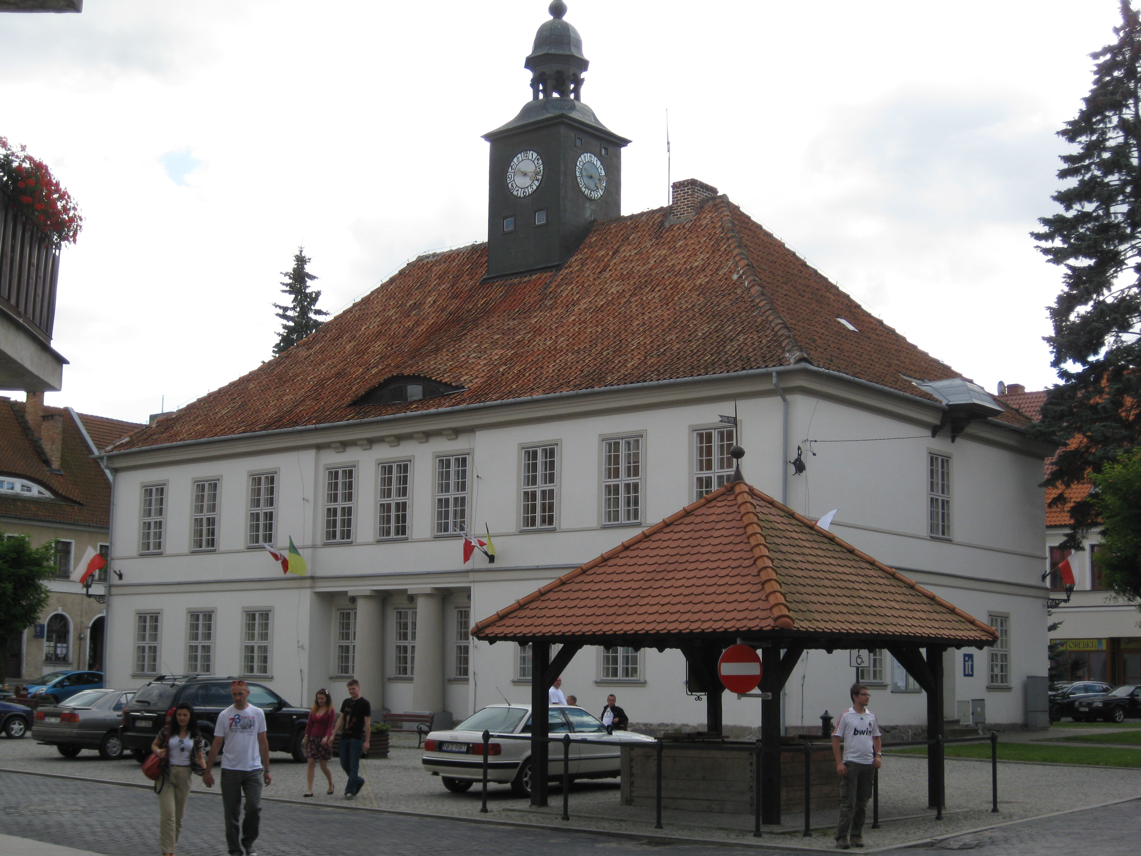 Reszel, Rynek 24 - Ratusz (zabytek nr A-282)